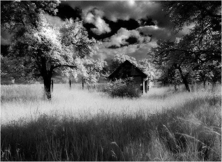 Schwarz/Weiss IR